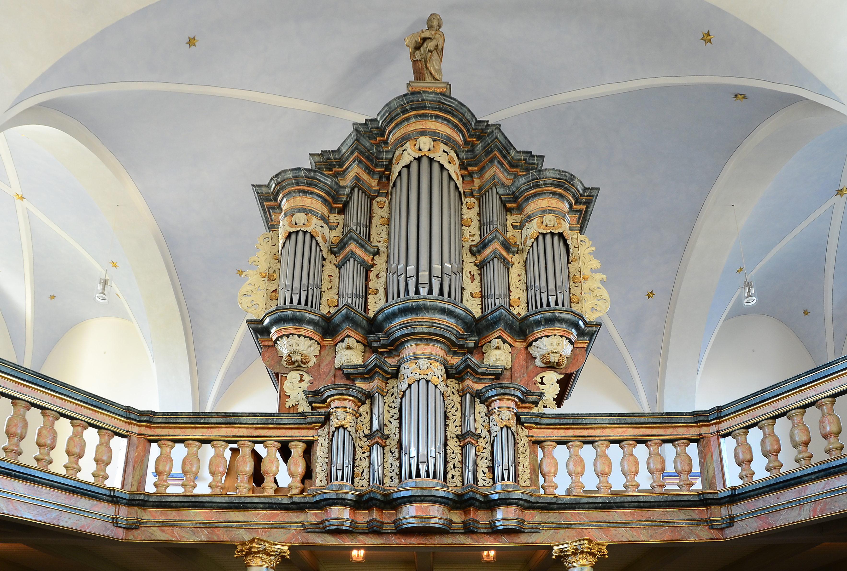 St.Pankratiuskirche, die Orgel